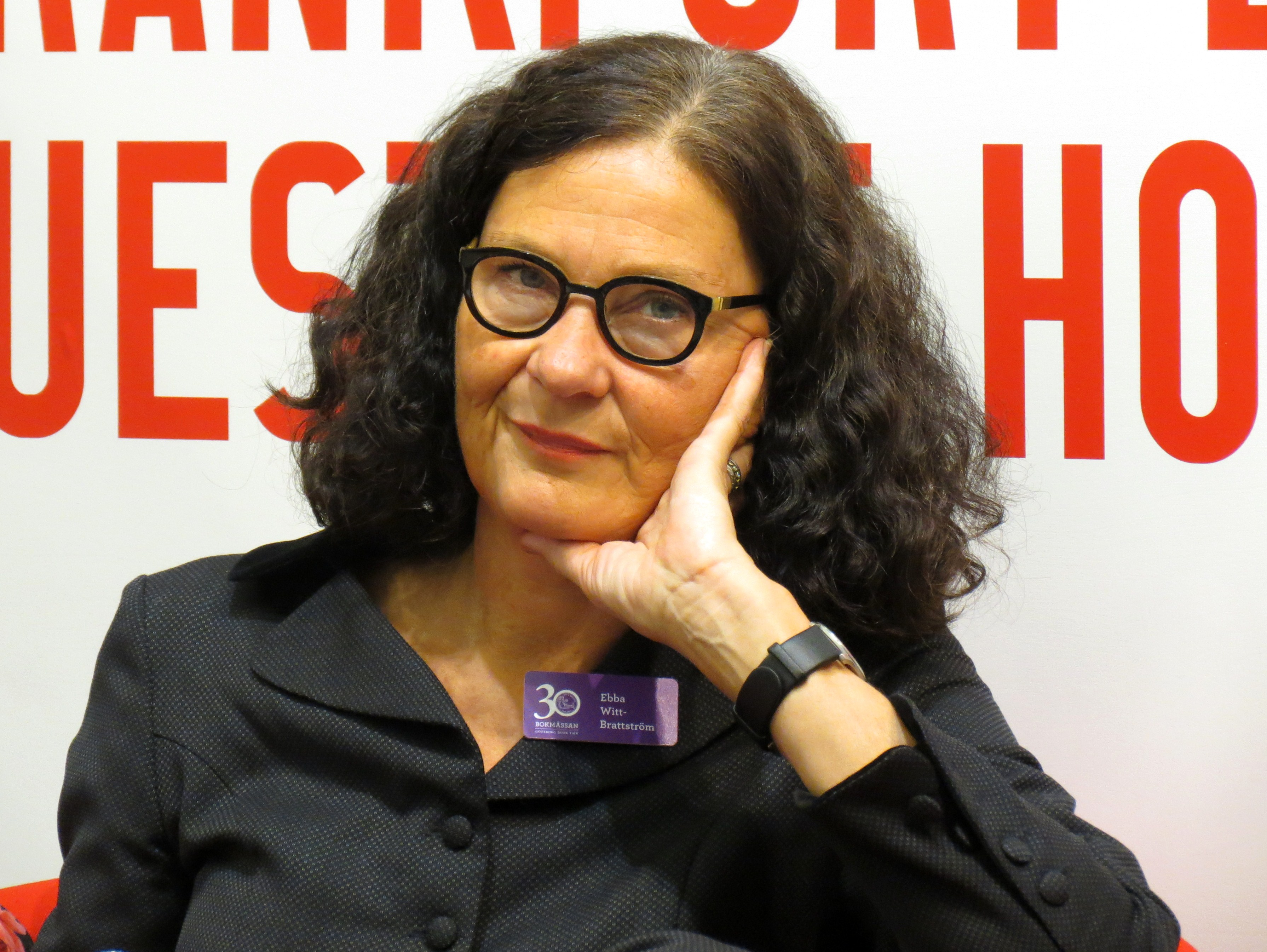 Ebba Witt-Brattström på Bokmässan 2014.